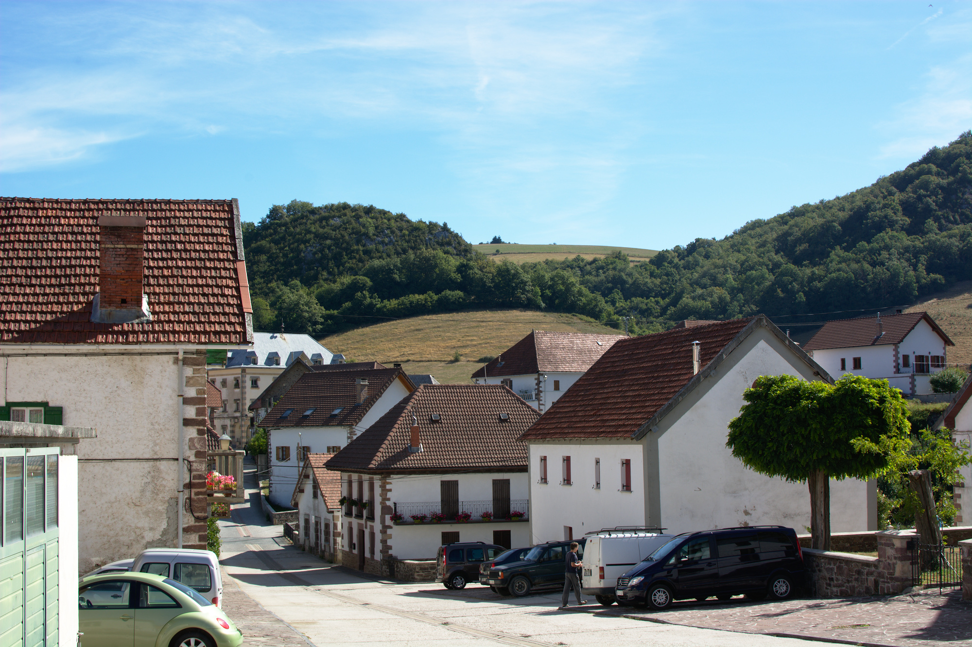 Municipios sin fotografía